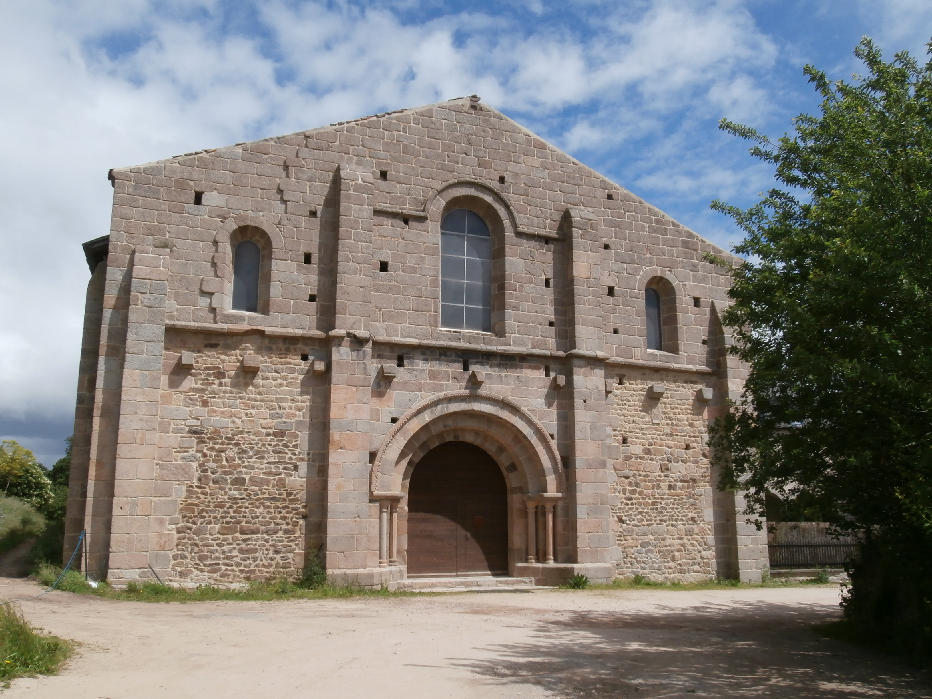 Église abbatiale de l'Abbaye Notre-Dame de Bellaigue, à Virlet (Puy-de-Dôme)